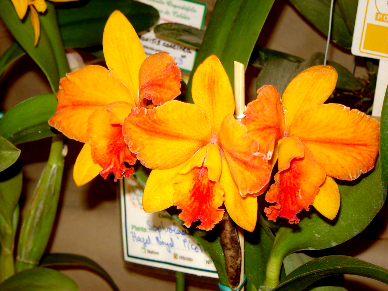 Orquídea Slc. Hazel Boyd.